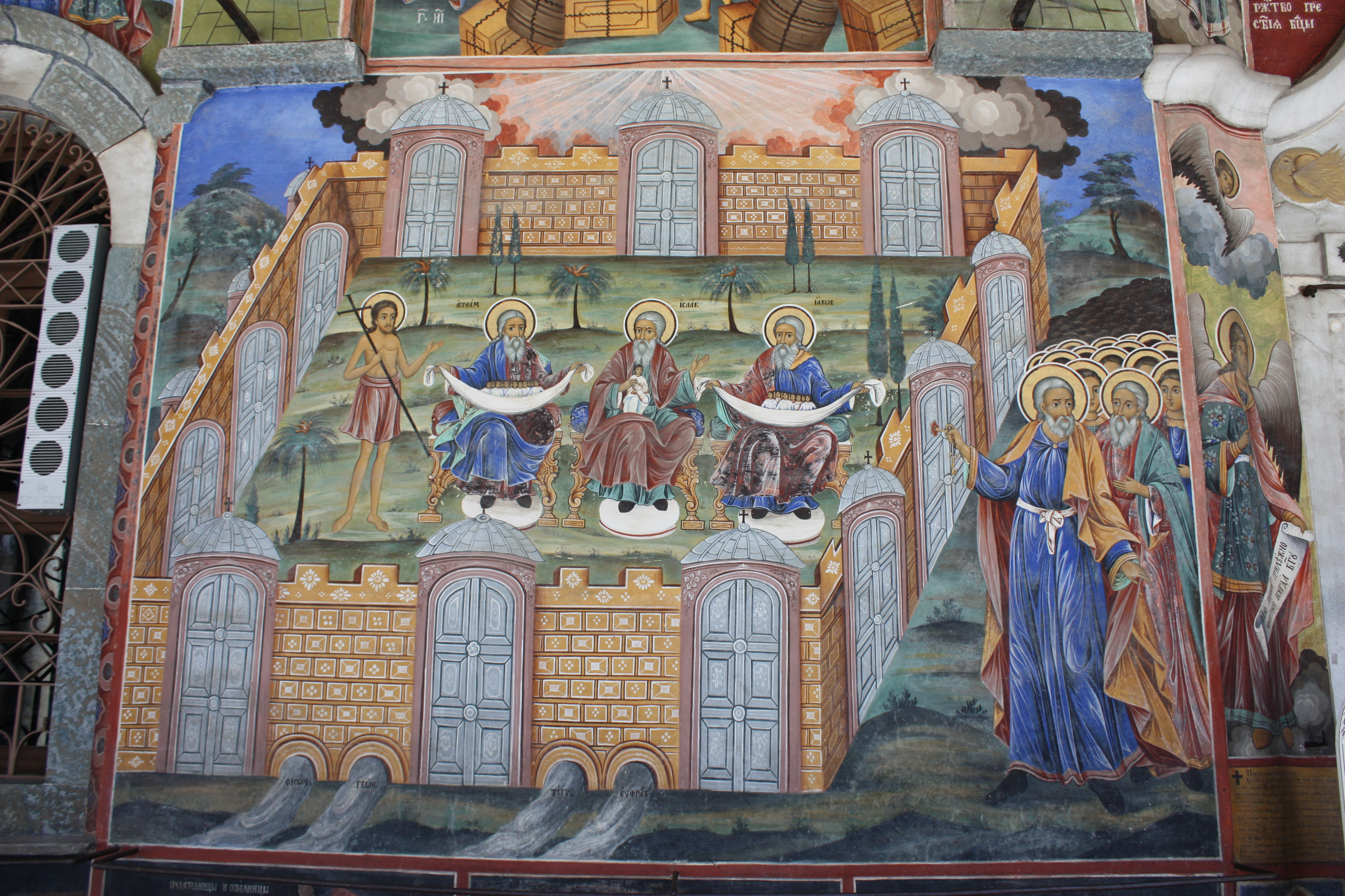 Rila Monastery, Rilakloster, Kloster Rila, Рилски манастир, Bulgaria